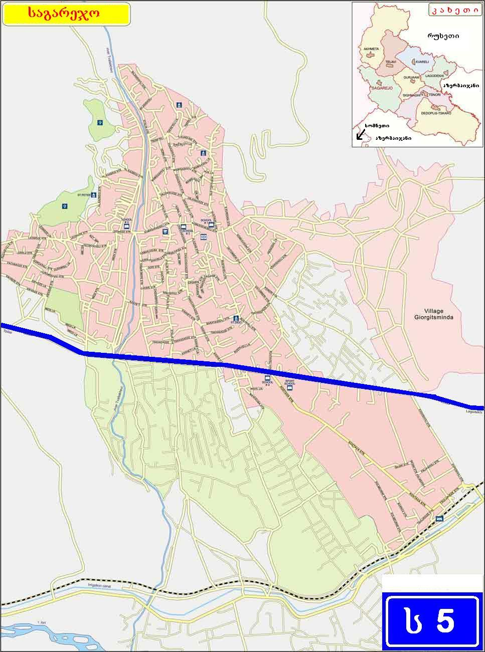 საქართველოს საავტომობილო მაგისტრალი ს5 საგარეჯოში